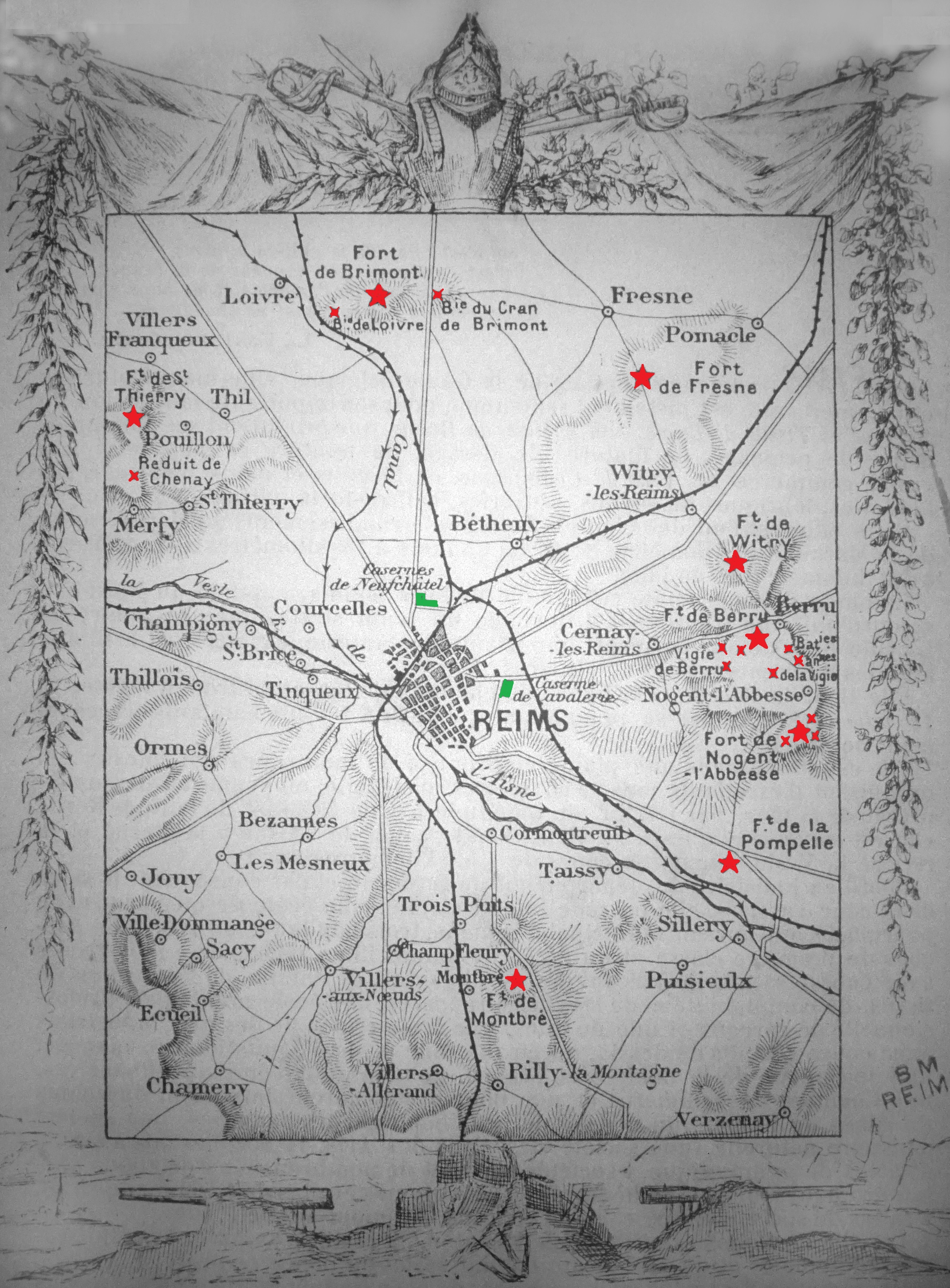 Plan de Reims avec les défenses Séré de Rivières fin XIXe.